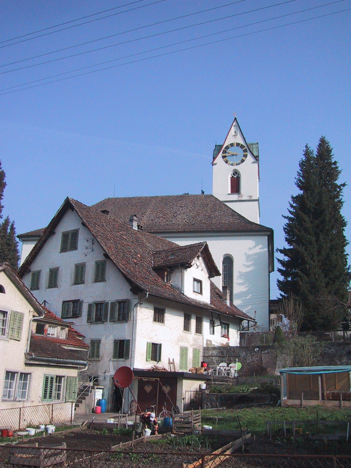 Aufnahme der Dorfkirche in Hinwil, ZH